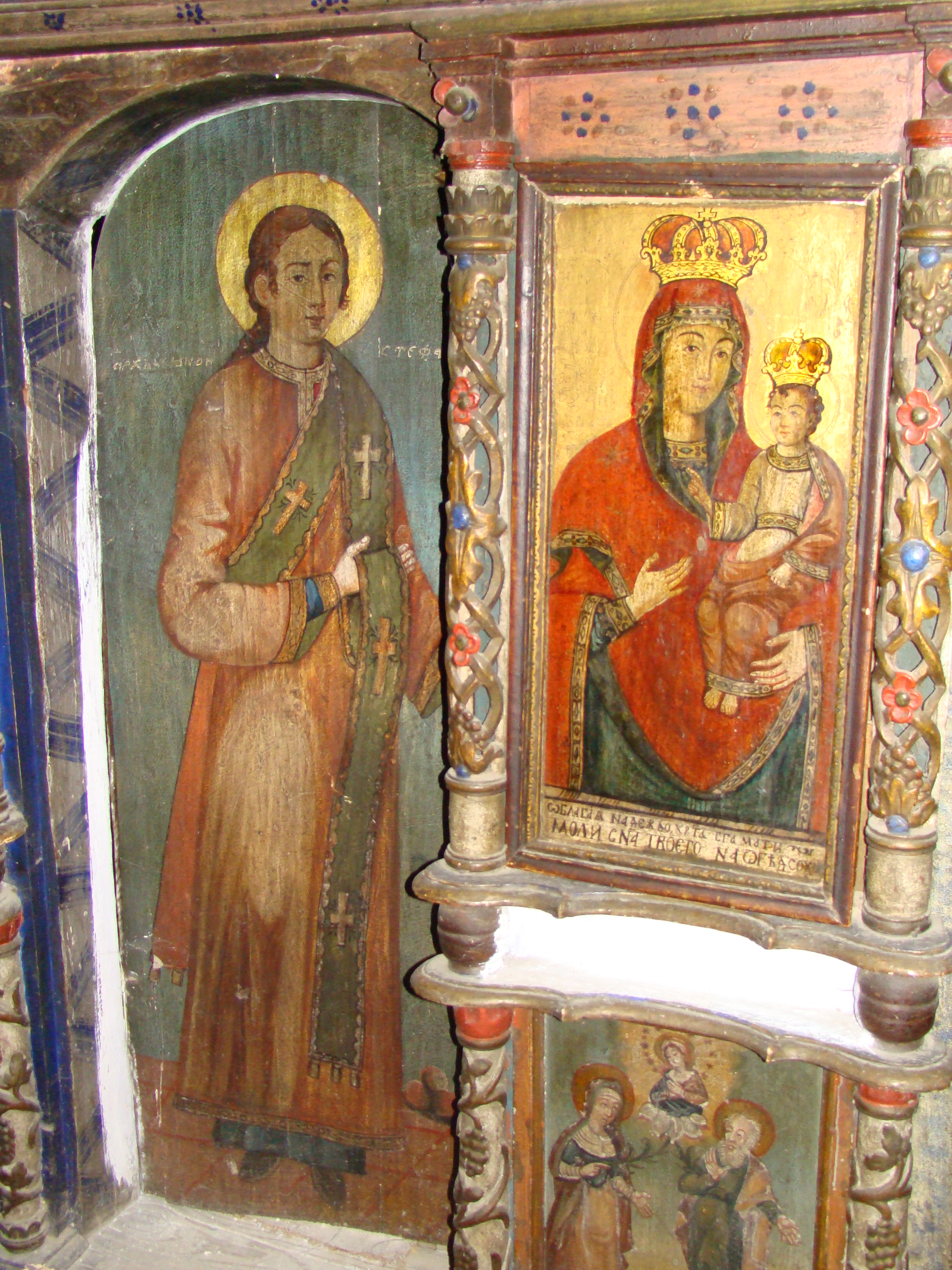 Biserica de lemn din Suplai-interioare